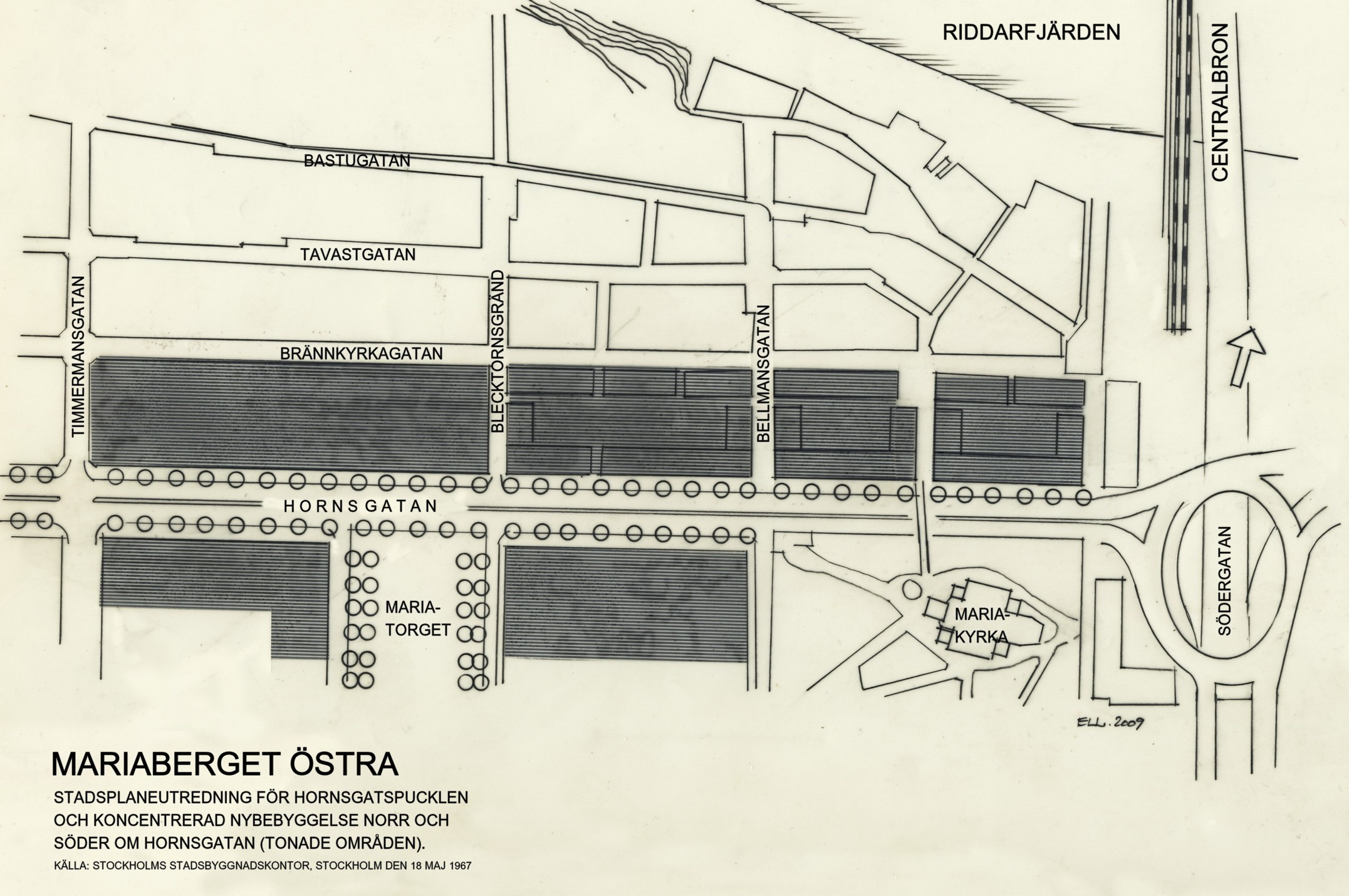 Stockholms stadsbyggnadskontorets utredningsförslag för Mariaberget och Hornsgatan.